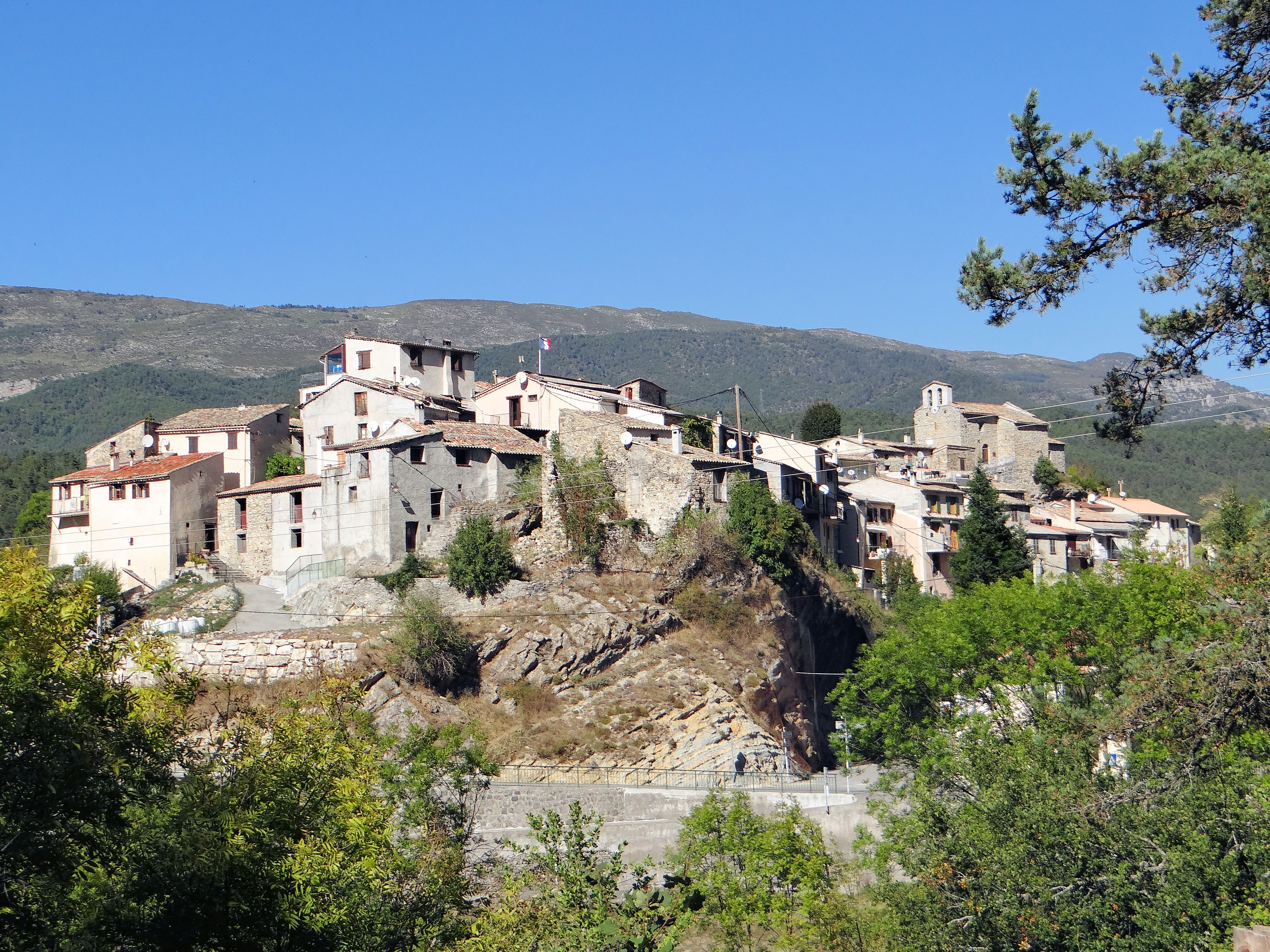 Collongues - Vue d'ensemble